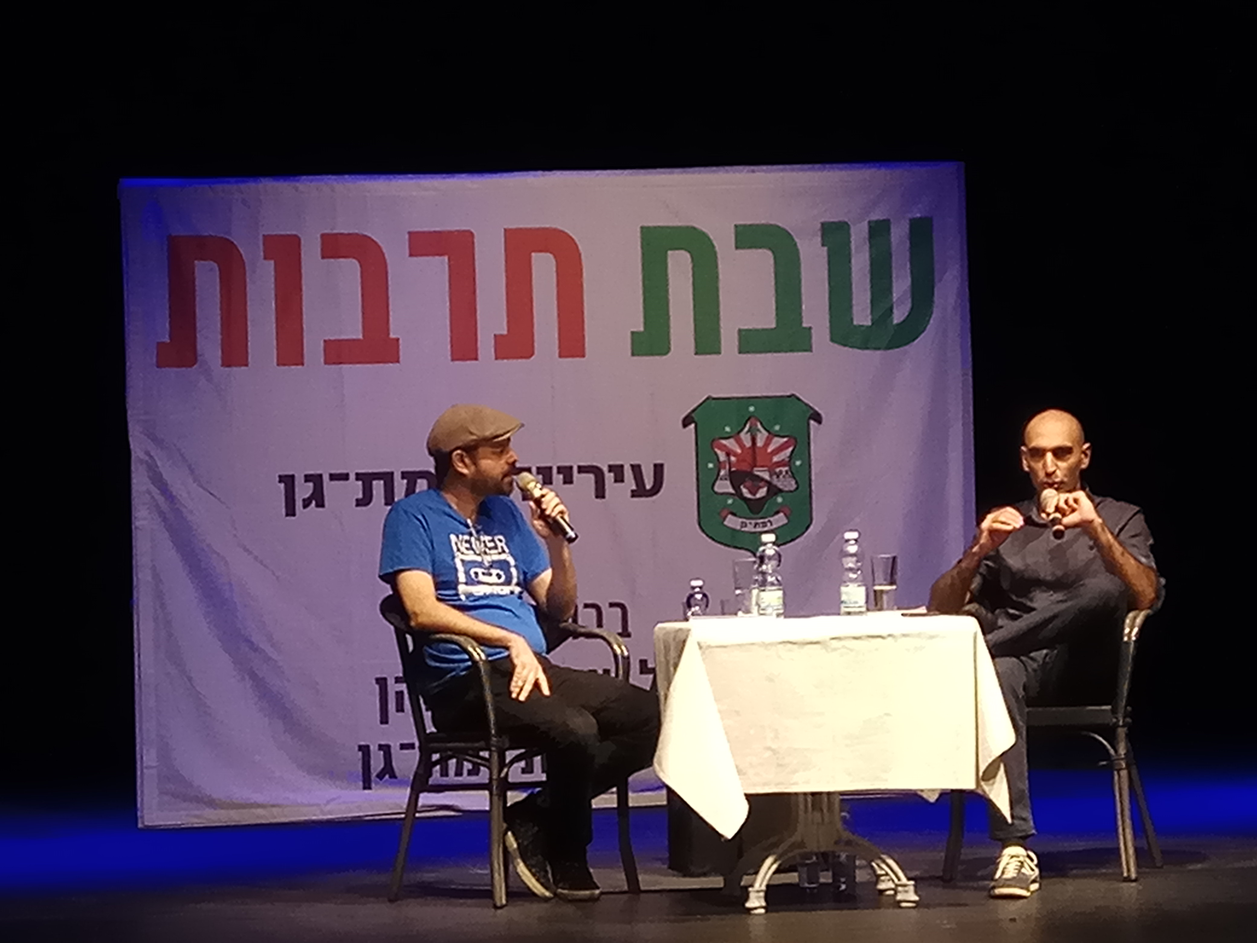 איתי הרמן באירוע שבתרבות ברמת גן עם אסף ליברמן